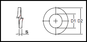 DIN 127